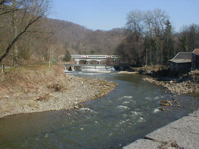 Walon: Aiwe di Vesse å Trô